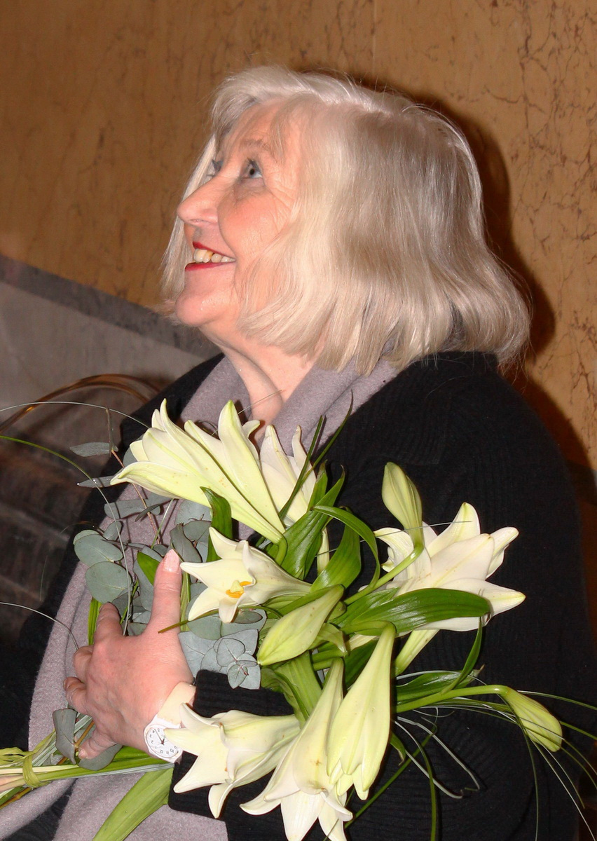 Hilla Becher, vernisáž výstavy Bernd a Hilla Becher: Doly. Hutě. Galerie Rudolfinum, Praha